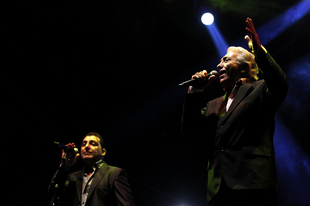 Carlos Goberna Junior (izquierda) y Carlos Goberna de Sonora Borinquen.